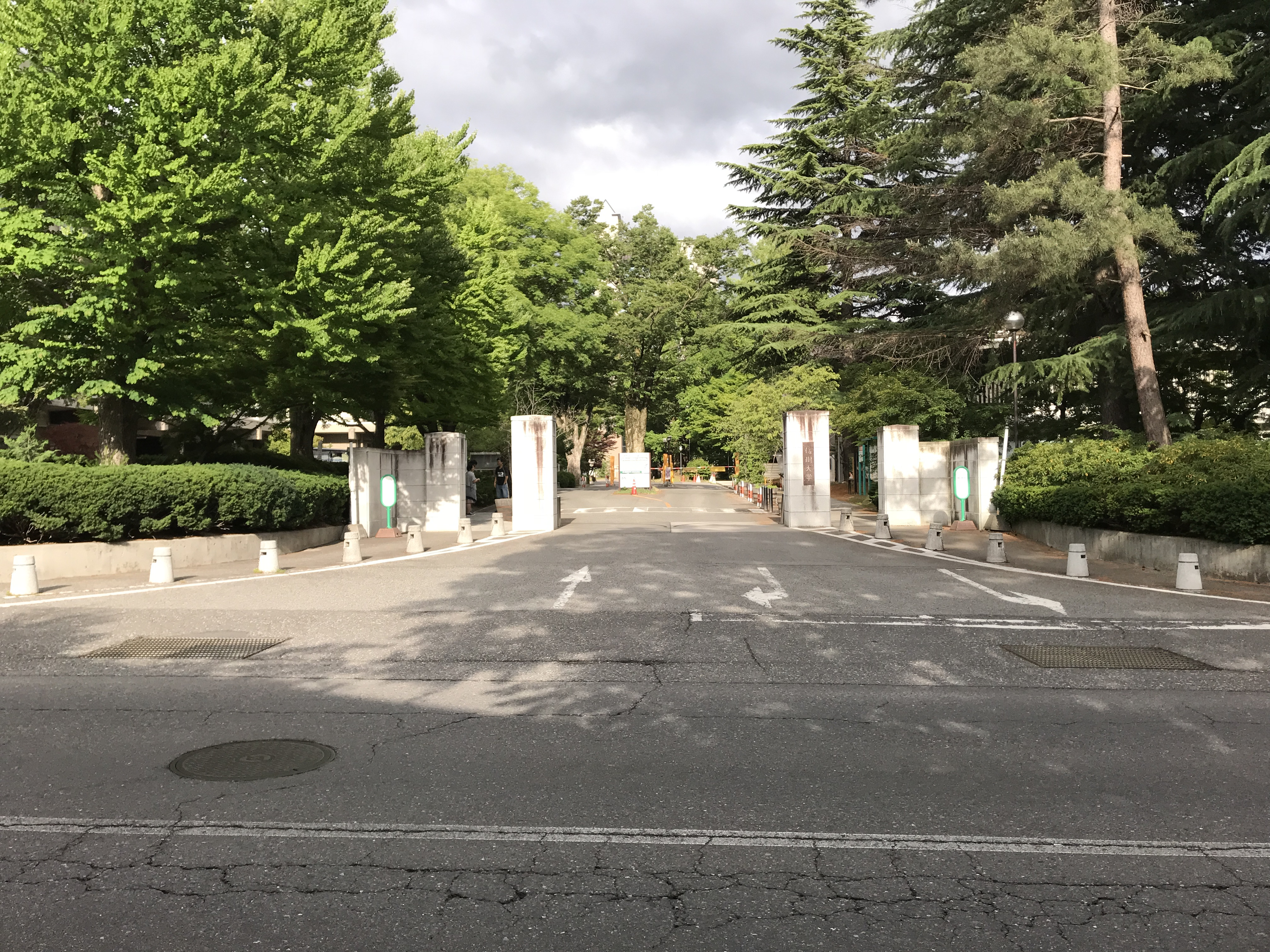 信州大学の門。